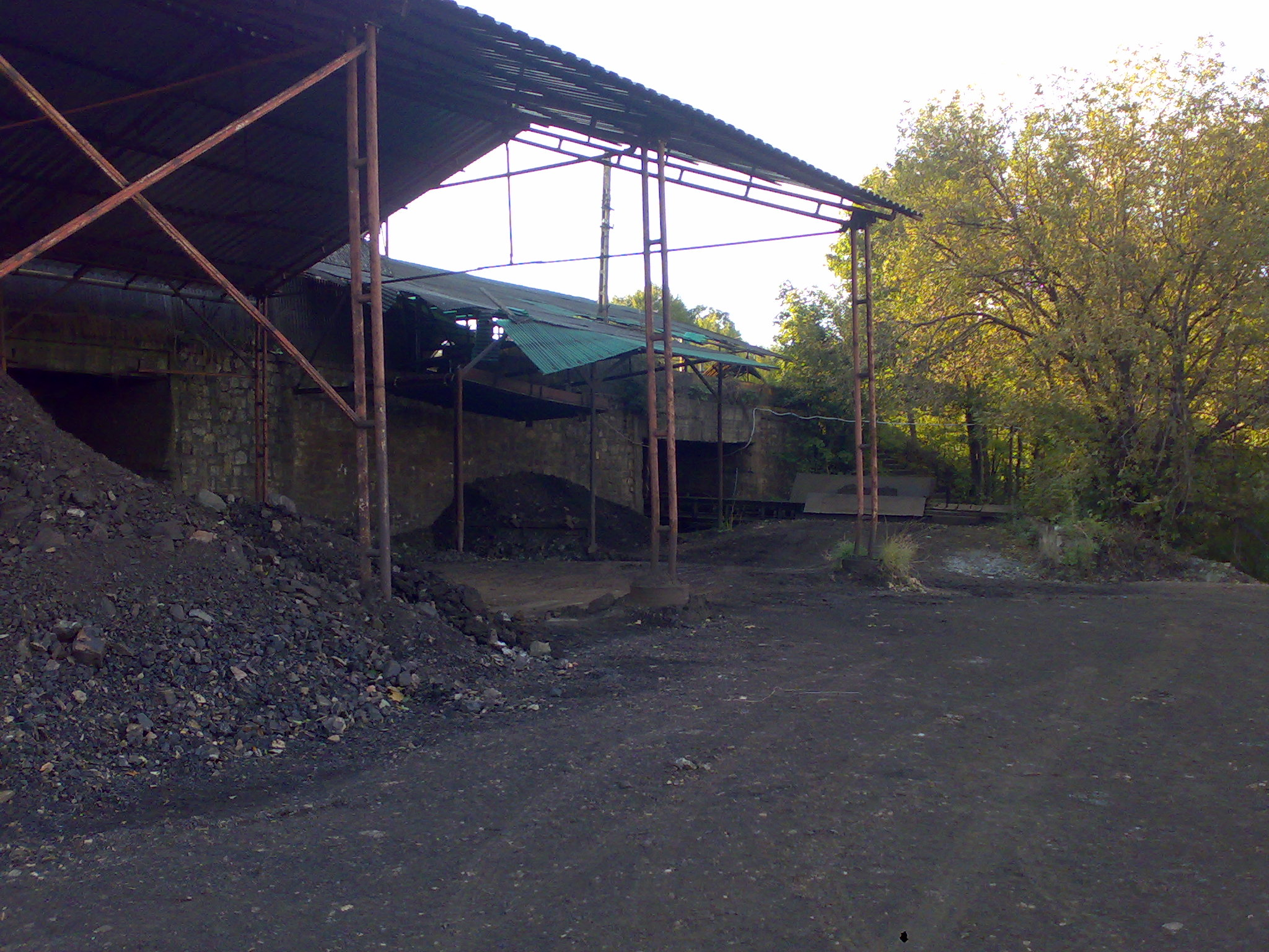 Mangánbánya